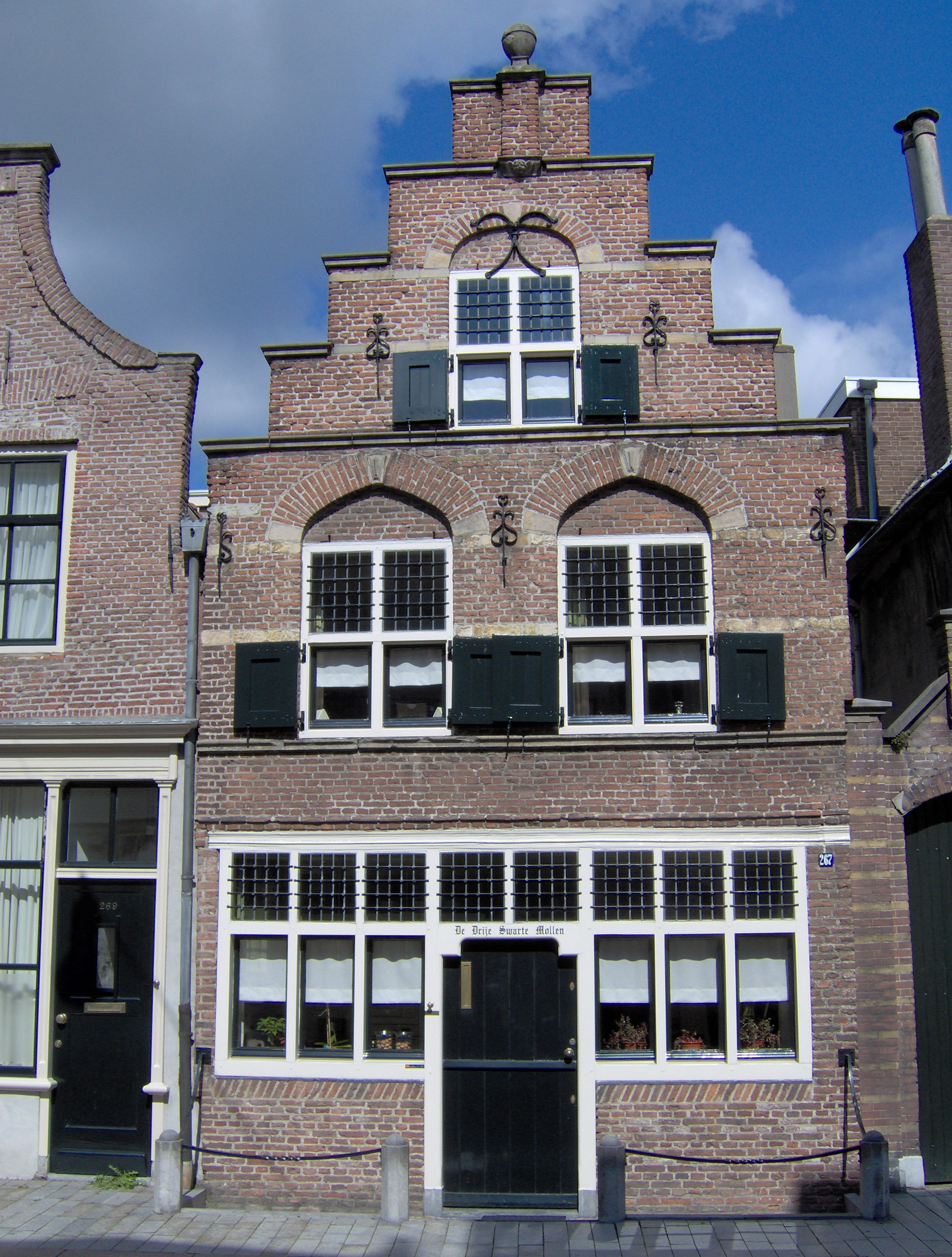 eigen foto